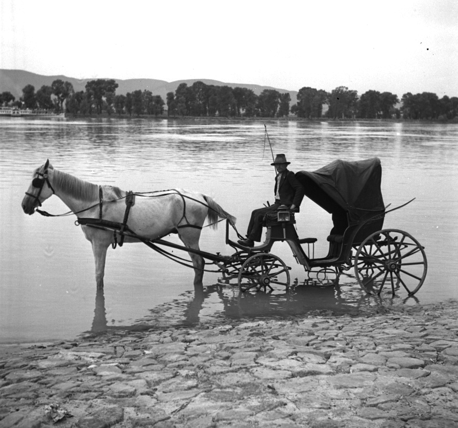 konflis a Duna-parton. . Location: Hungary, Vác Tags: Horse-drawn carriage, shore Title: konflis a Duna-parton. .